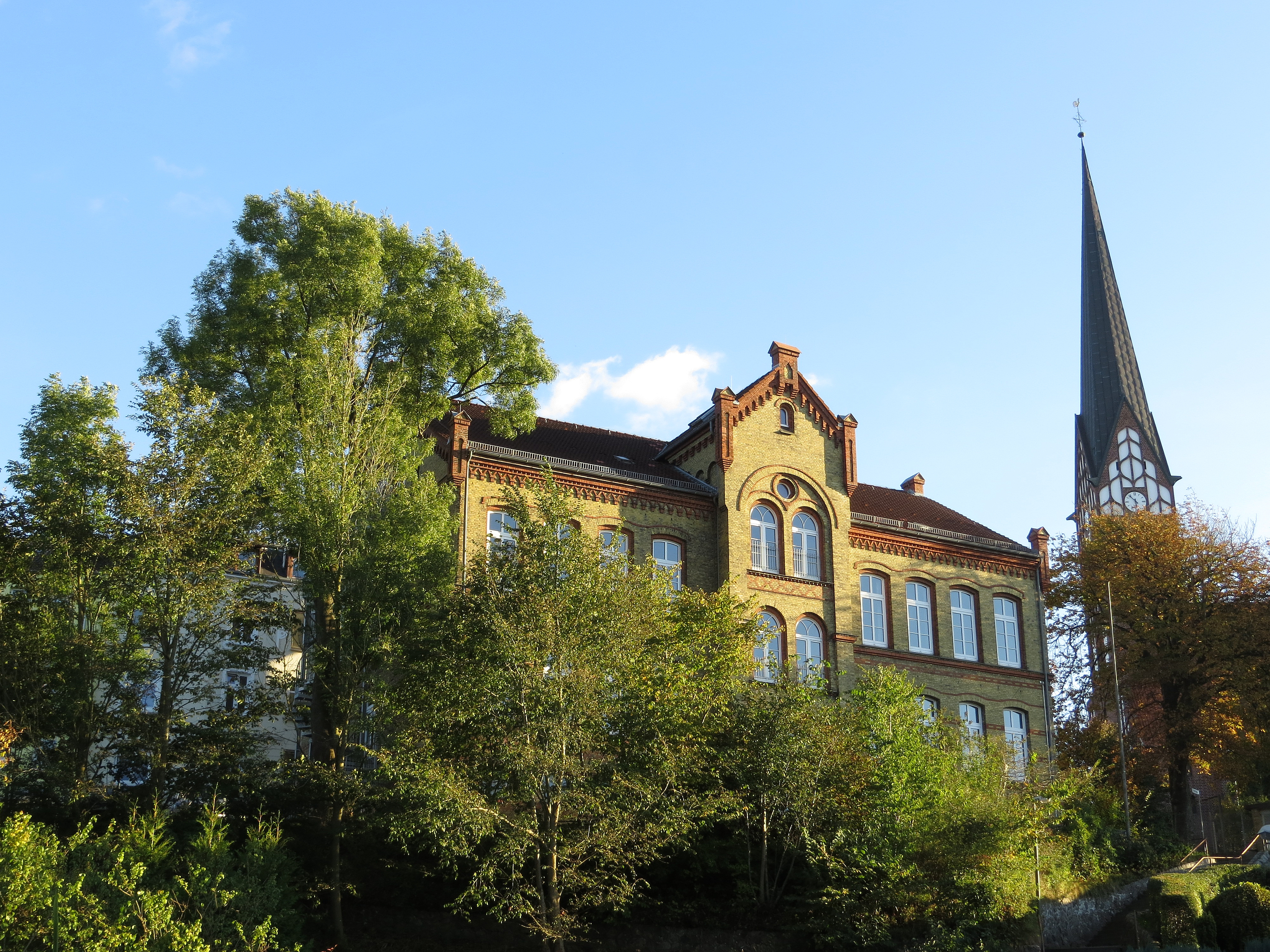 Offener Kanal Flensburg, Bild 01